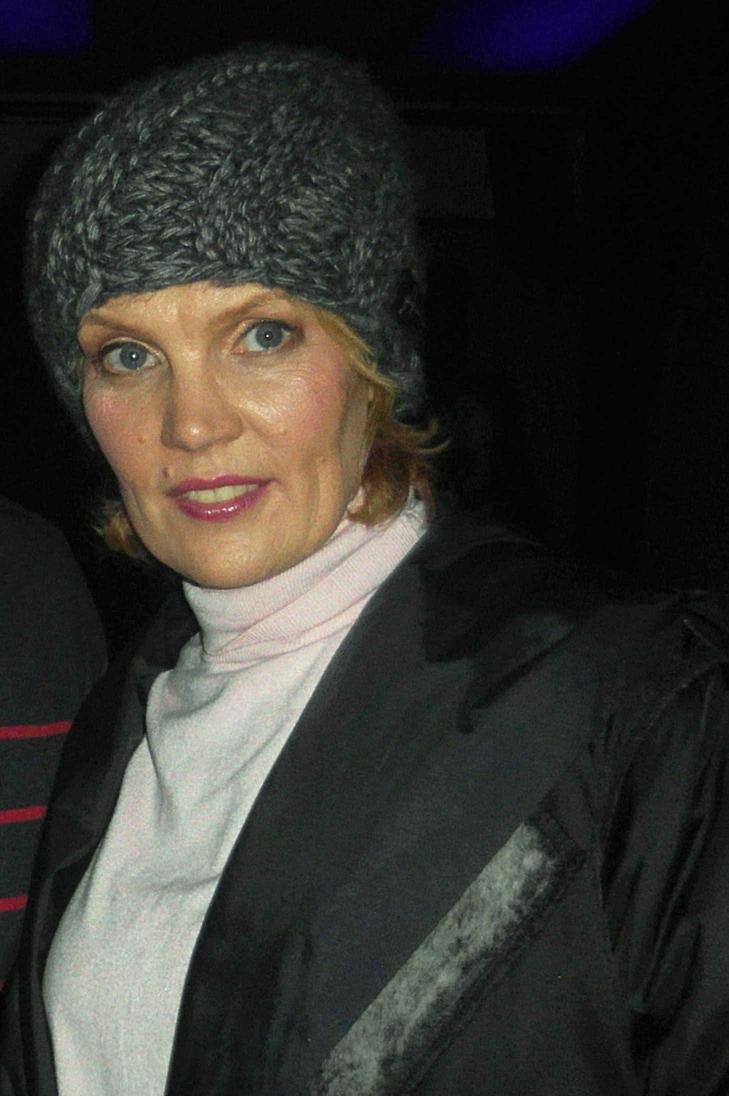 Dorota Chotecka-Pazura, aktorka.